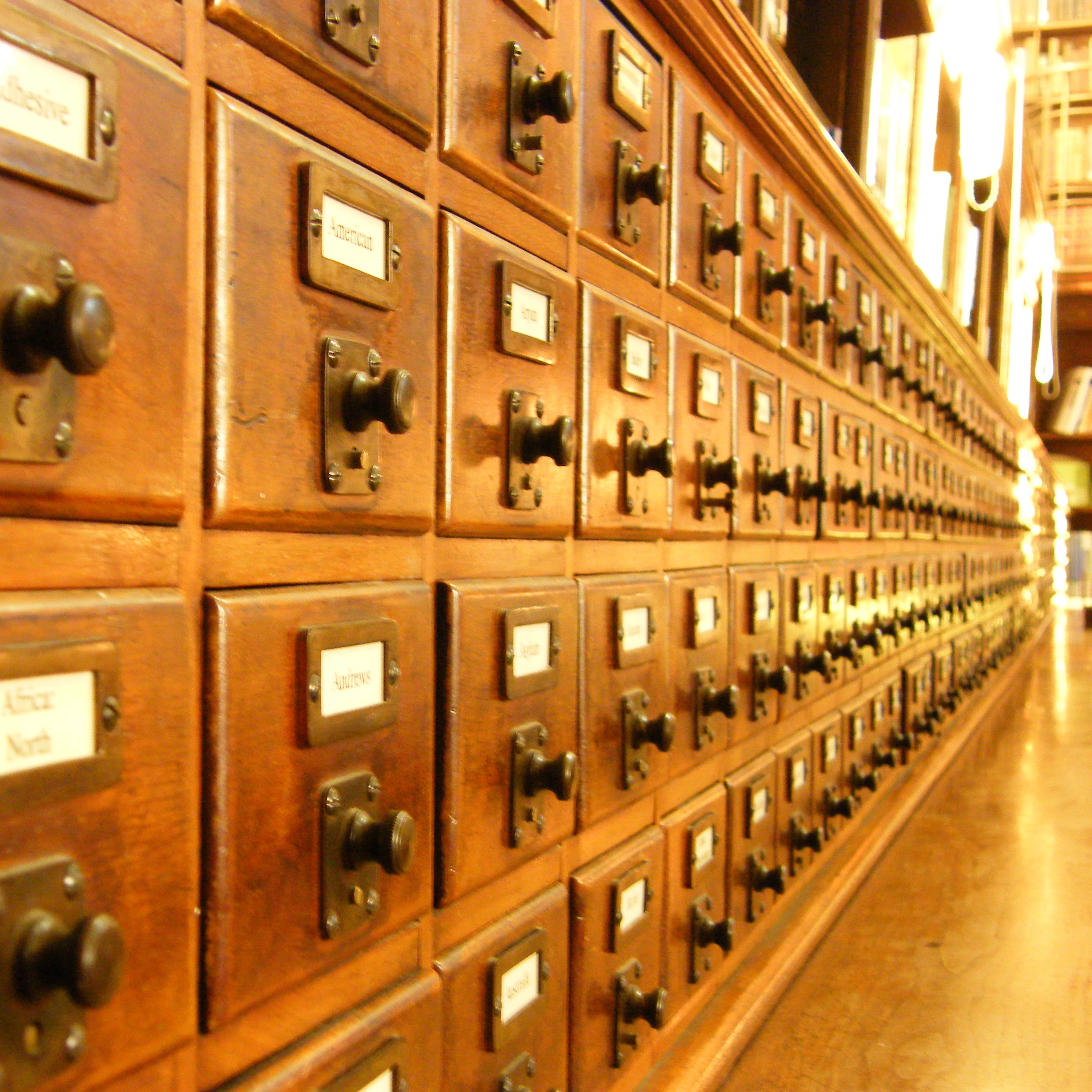 Index